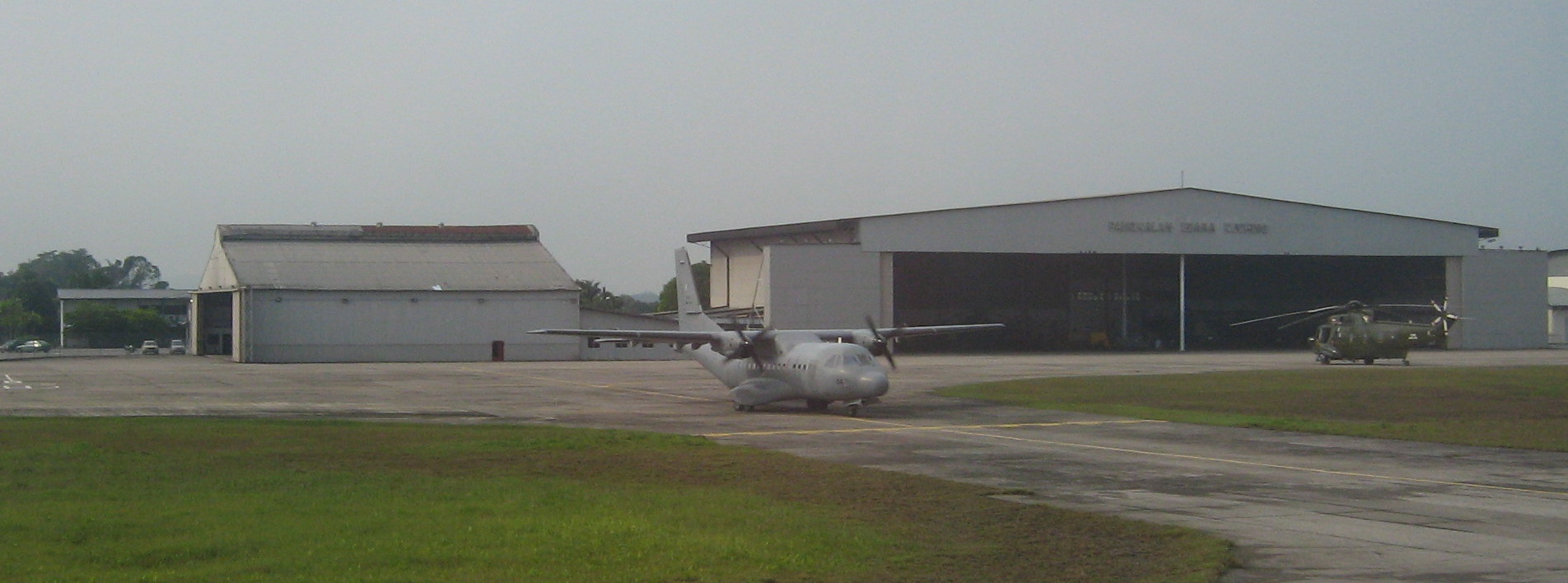 military basis at kuching airport